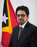 Abgeordneter des Nationalparlaments Osttimors